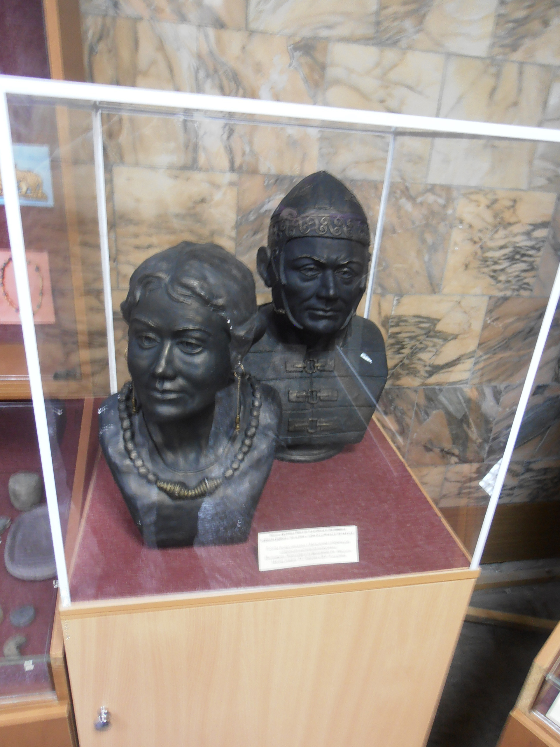 Реконструкция бюстов мужчины и женщины периода раннего железного века (саргатская культура). Работа выполнена в Московской лаборатории антропологической реконструкции Института Этнологии и Антропологии им. Миклухо-Маклая. Авторы Т. С. Балуева и И. В. Каширина. Экспонат зала археологии Музея археологии и этнографии Тюменского государственного университета.